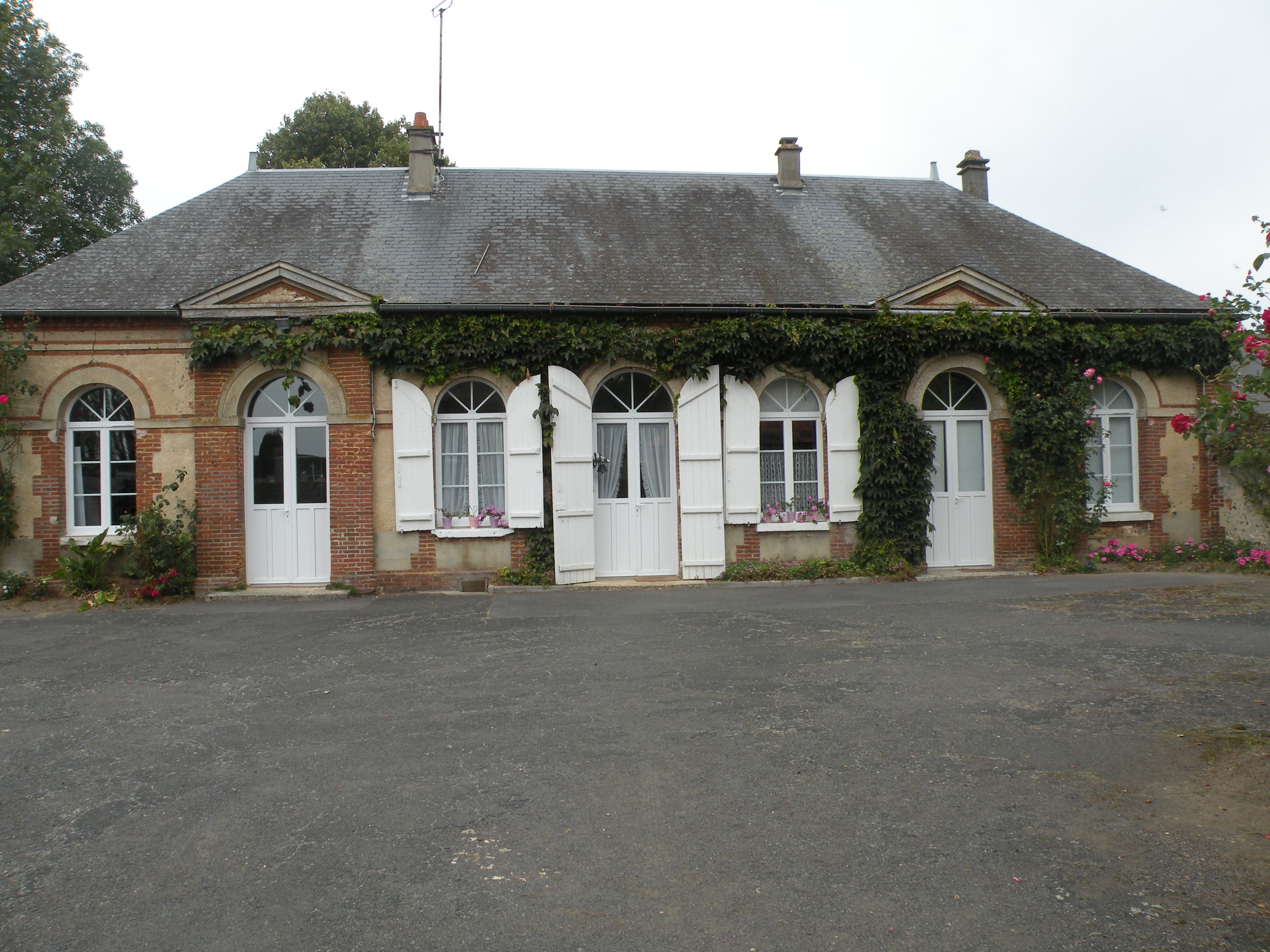 mairie Jaméricourt